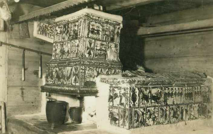 Гуцульський пєц